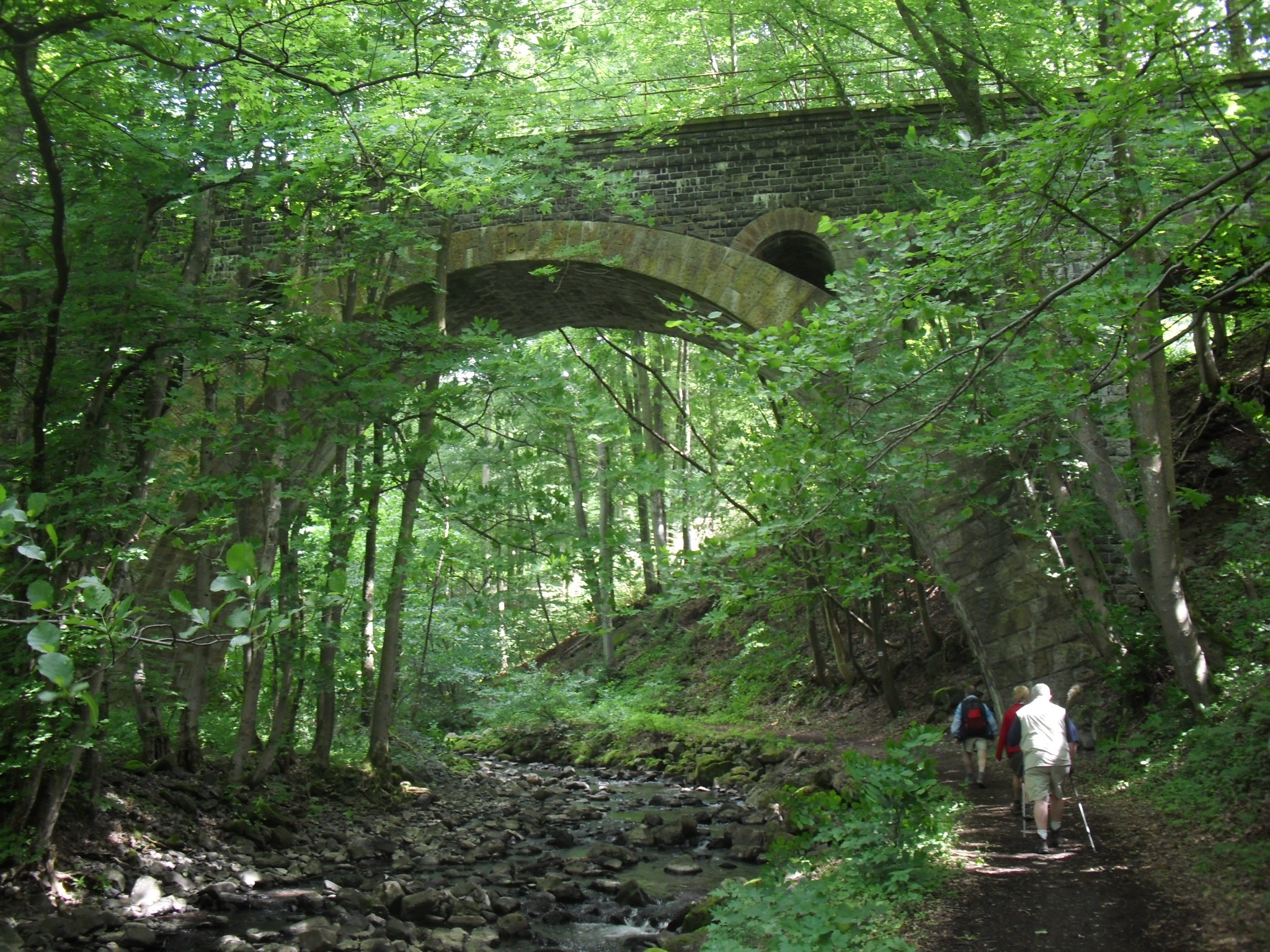 Eine einbogige Steinbrücke über die Nister, die dem 19. Jahrhundert zugeordnet wird (Langenbacher Straße) - Bad Marienberg (Westerwald) - Westerwaldkreis - Rheinland-Pfalz - Deutschland